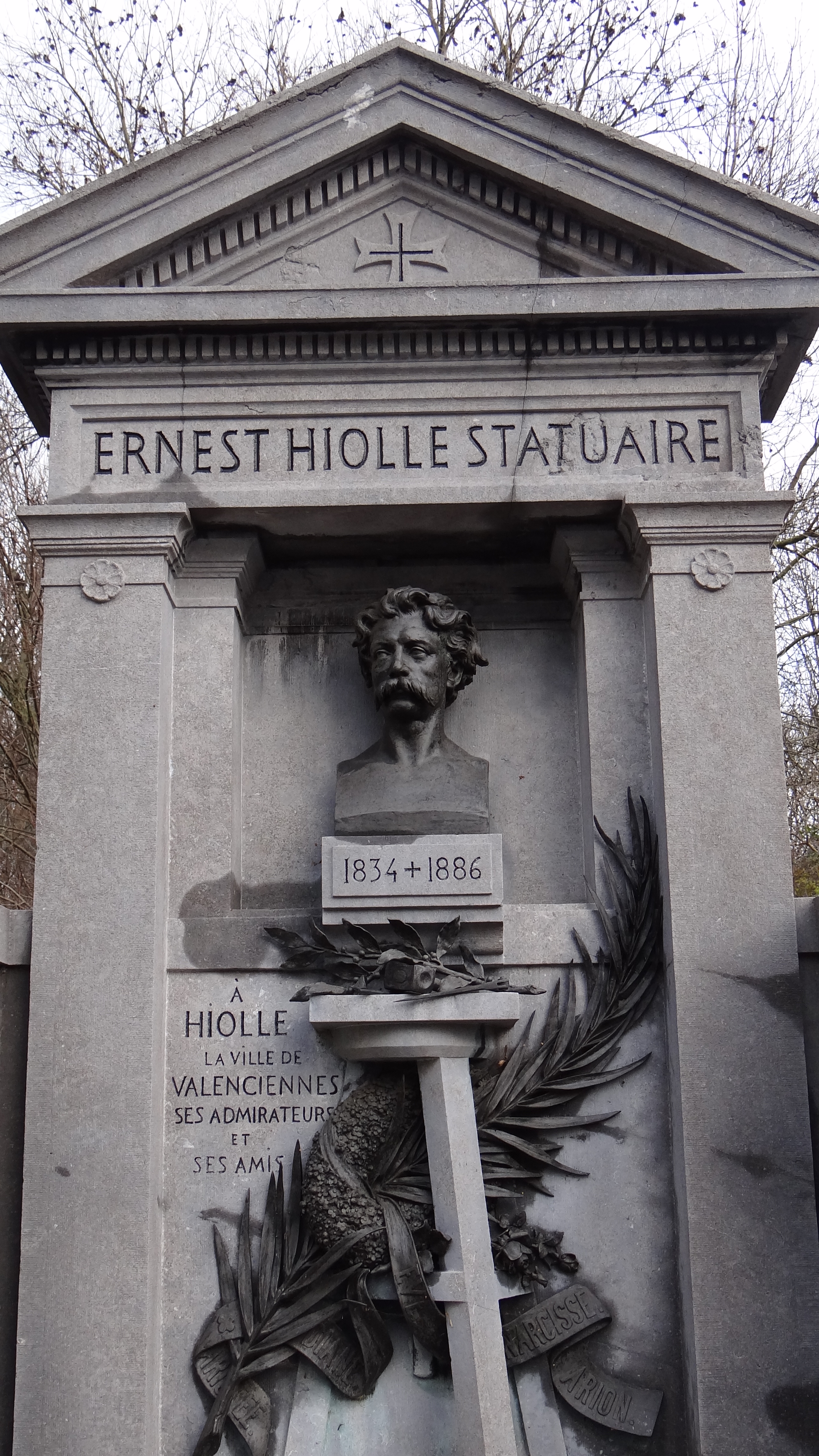 Valenciennes (France - département du Nord) - cimetière Saint Roch, dit aussi cimetière des Prix de Rome - Ernest Eugène Hiolle